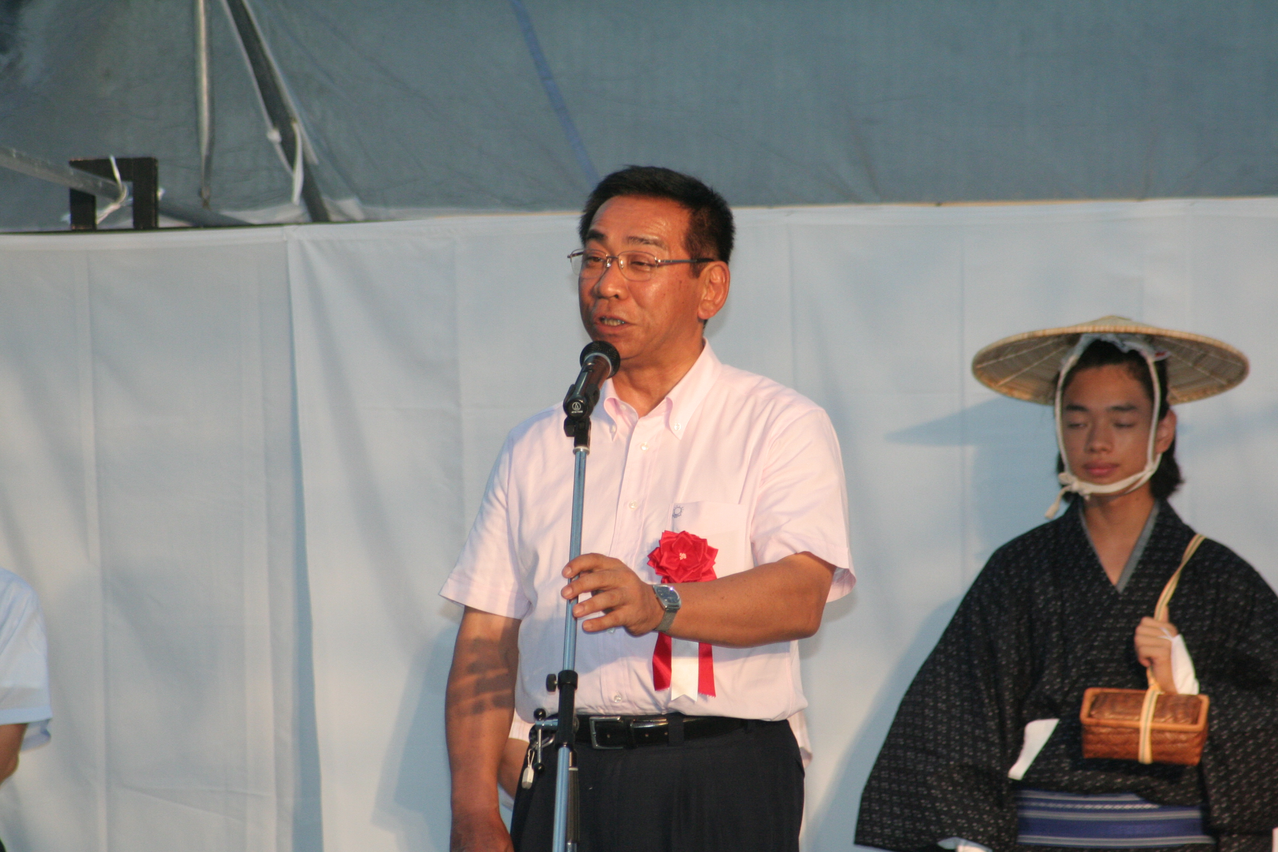 日本の兵庫県の政治家達。お夏清十郎祭にて撮影。松本剛明、戸井田徹、石見利勝の3人。